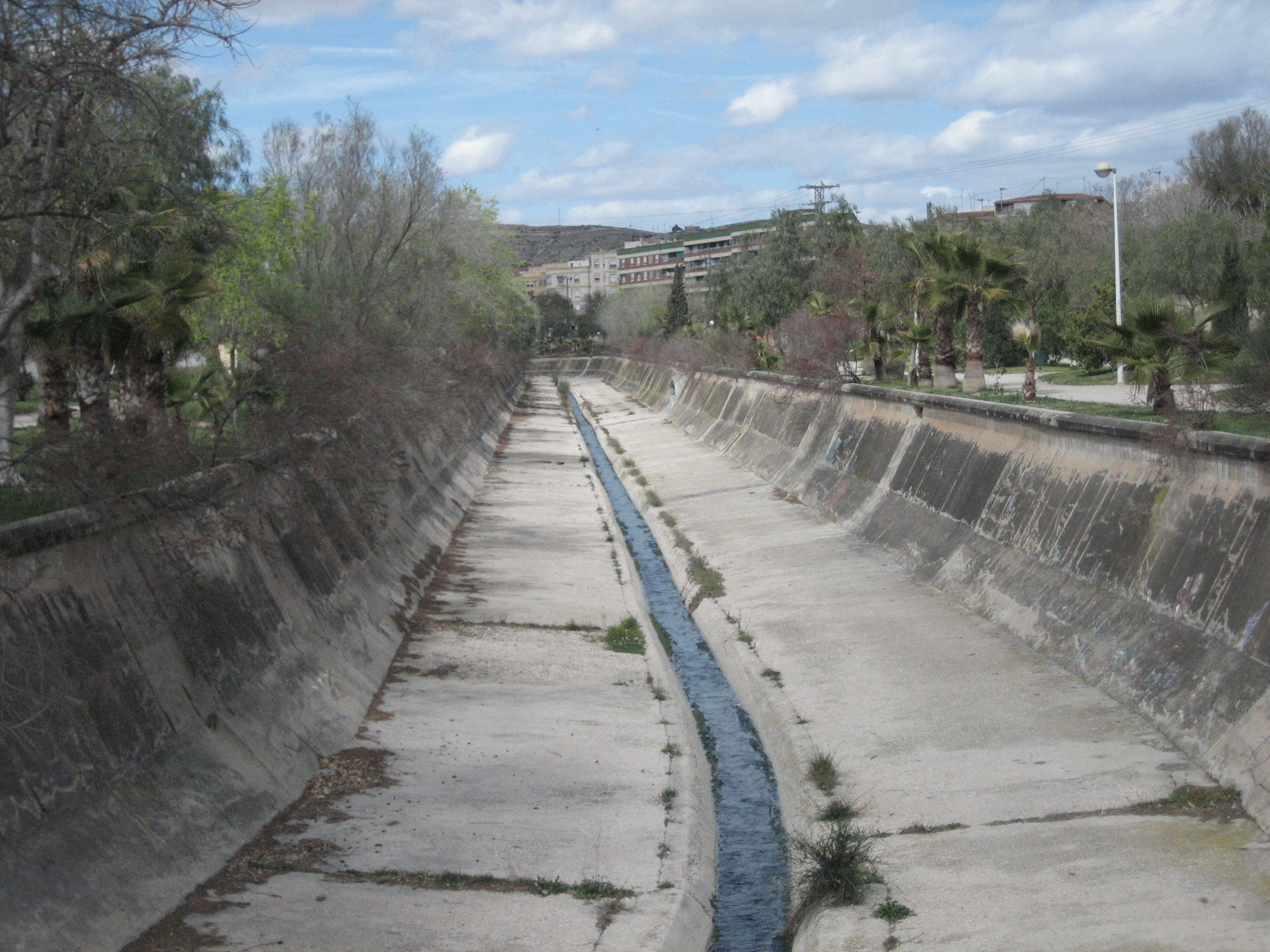 El río Vinalopó a su paso por Elda (Alicante, España). Fotografía realizada por Rodriguillo el 24/03/2006.